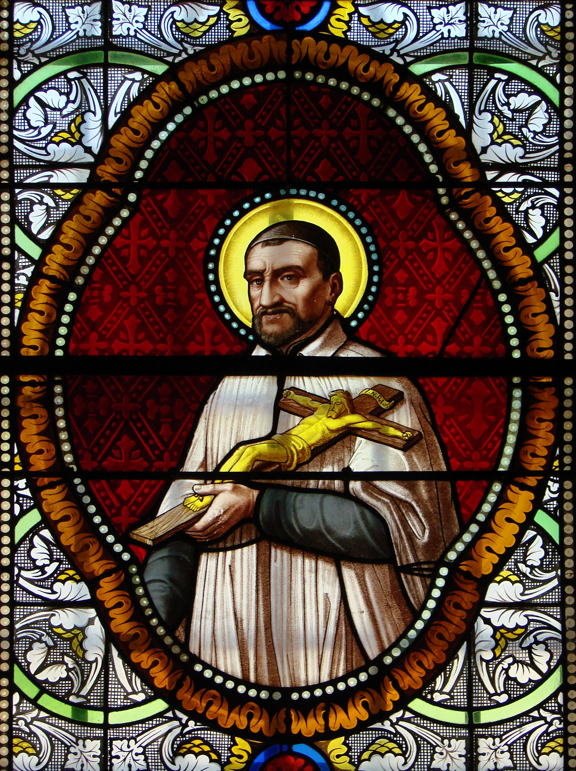 Vitrail néogothique dans l'église Saint-Martin de Florac: Saint Vincent de Paul.